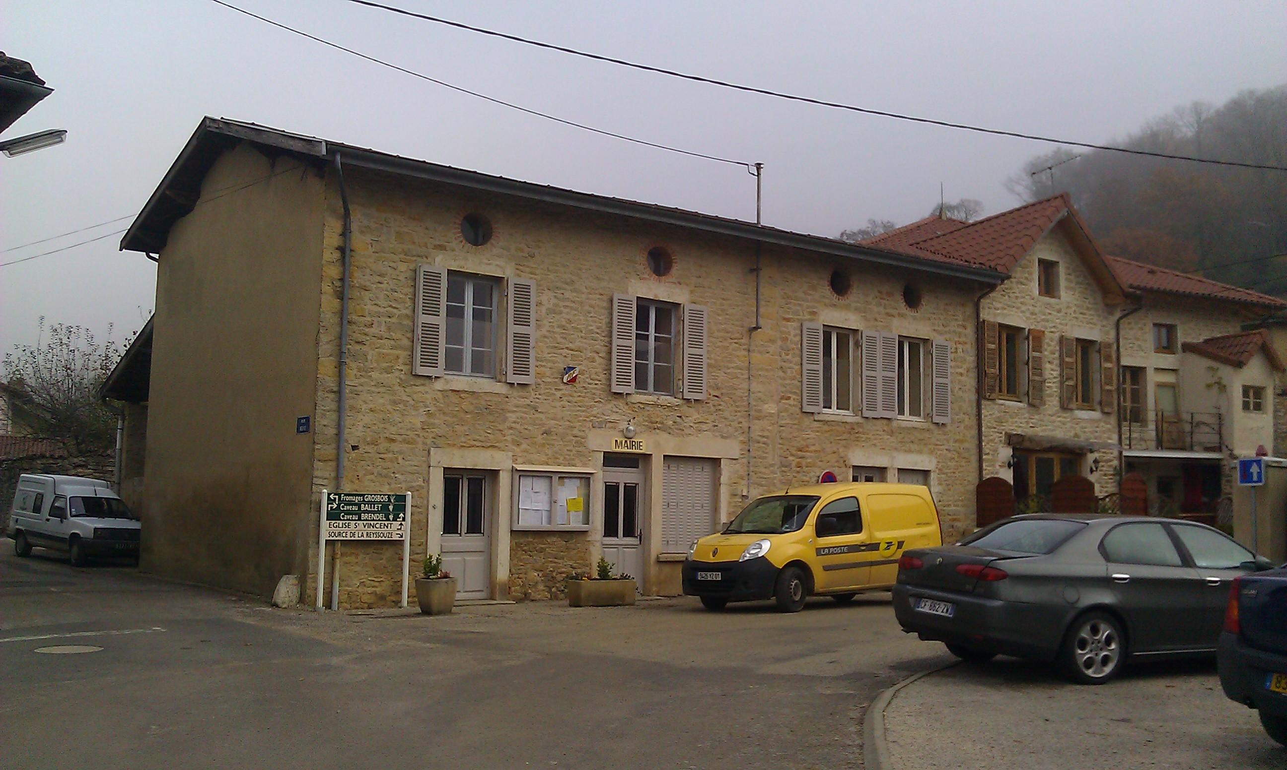 Mairie de Journans, Ain, France.